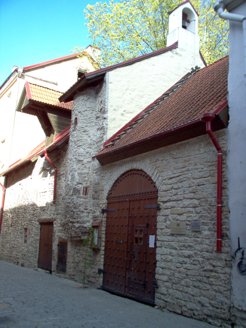 Tallinnas asuv Ukraina Kreeka-katoliku kirik